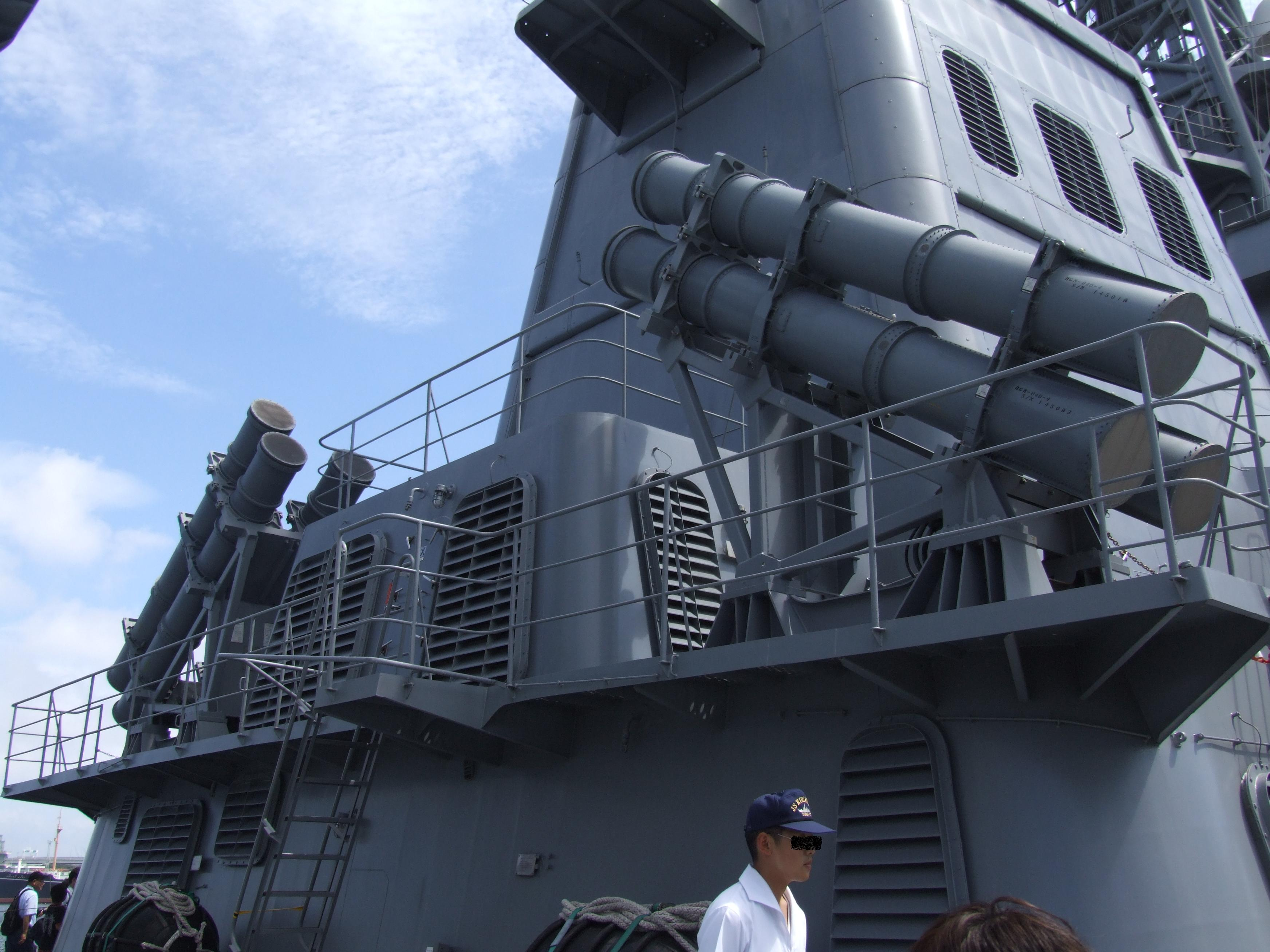 きりしまのハープーンミサイル発射機（横浜港開港150年での艦内開放にて撮影）